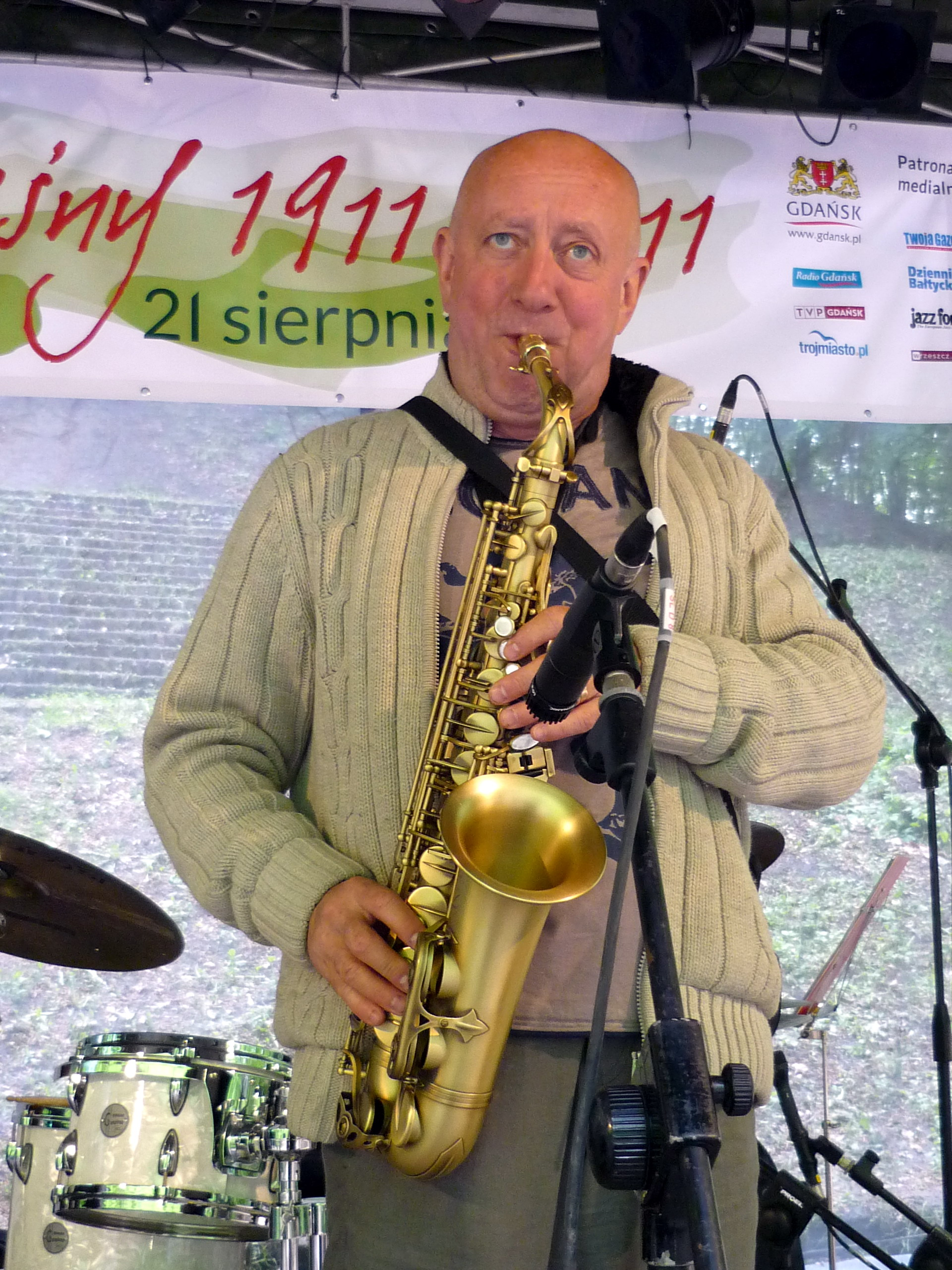 Henryk Miśkiewicz, Gdańsk 2011